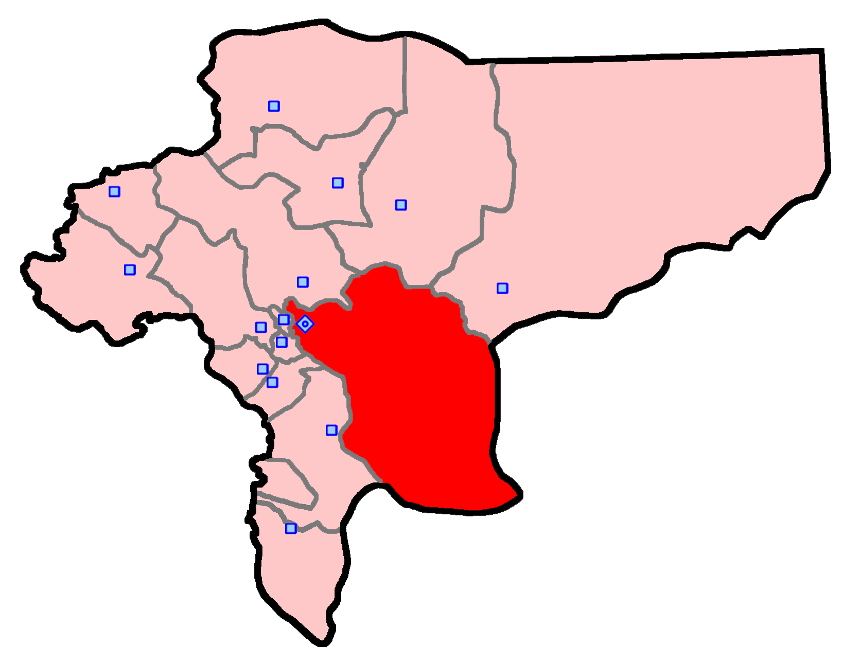 حوزهٔ انتخاباتی اصفهان برای انتخابات مجلس شورای اسلامی